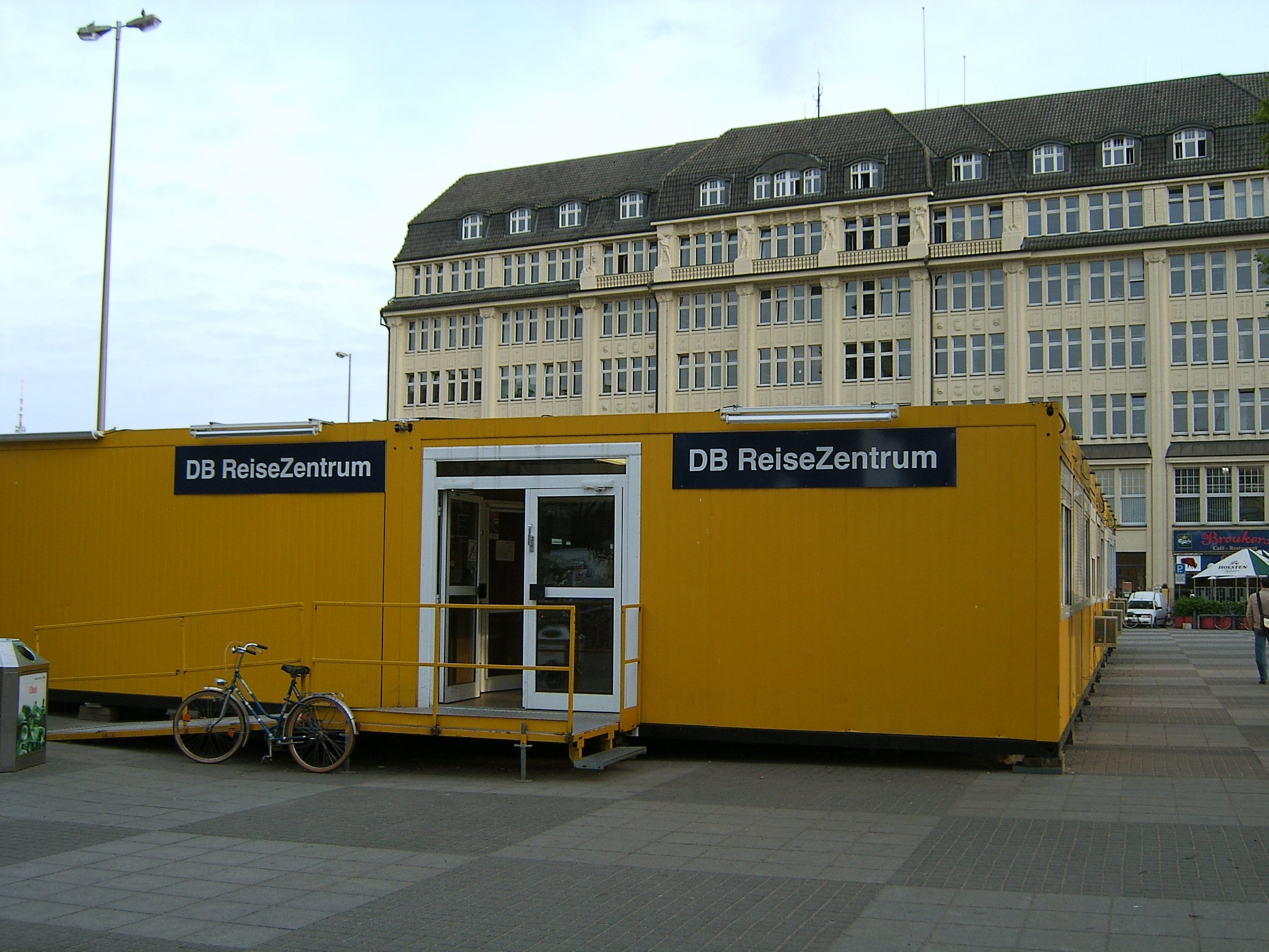 Bildbeschreibung: Hamburg, St. Georg, "Containerbahnhof" Fotograf: selbst Datum: 15.5.2006